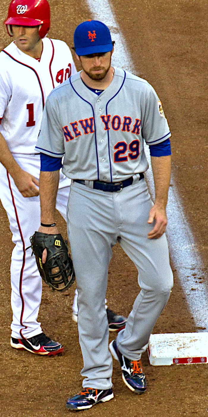 Ike Davis